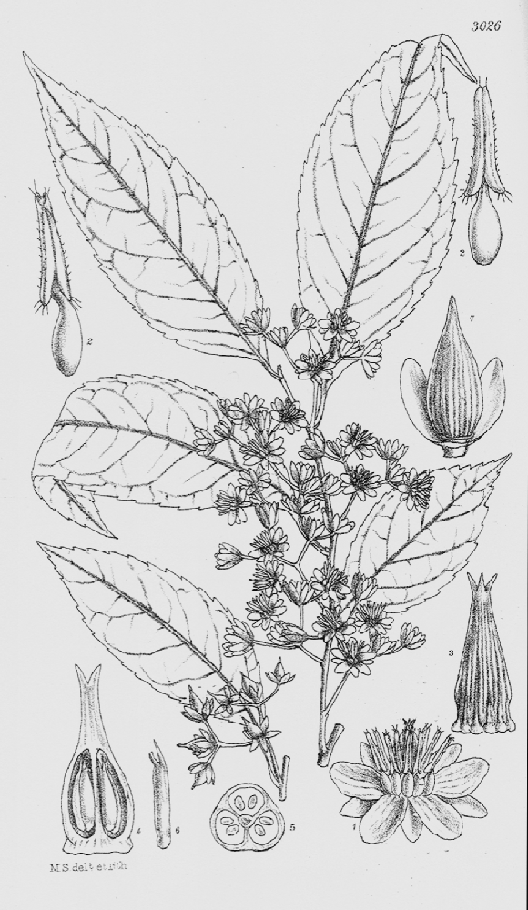 Sladenia celastrifolia. Icones Plantarum. Pl. 3026.